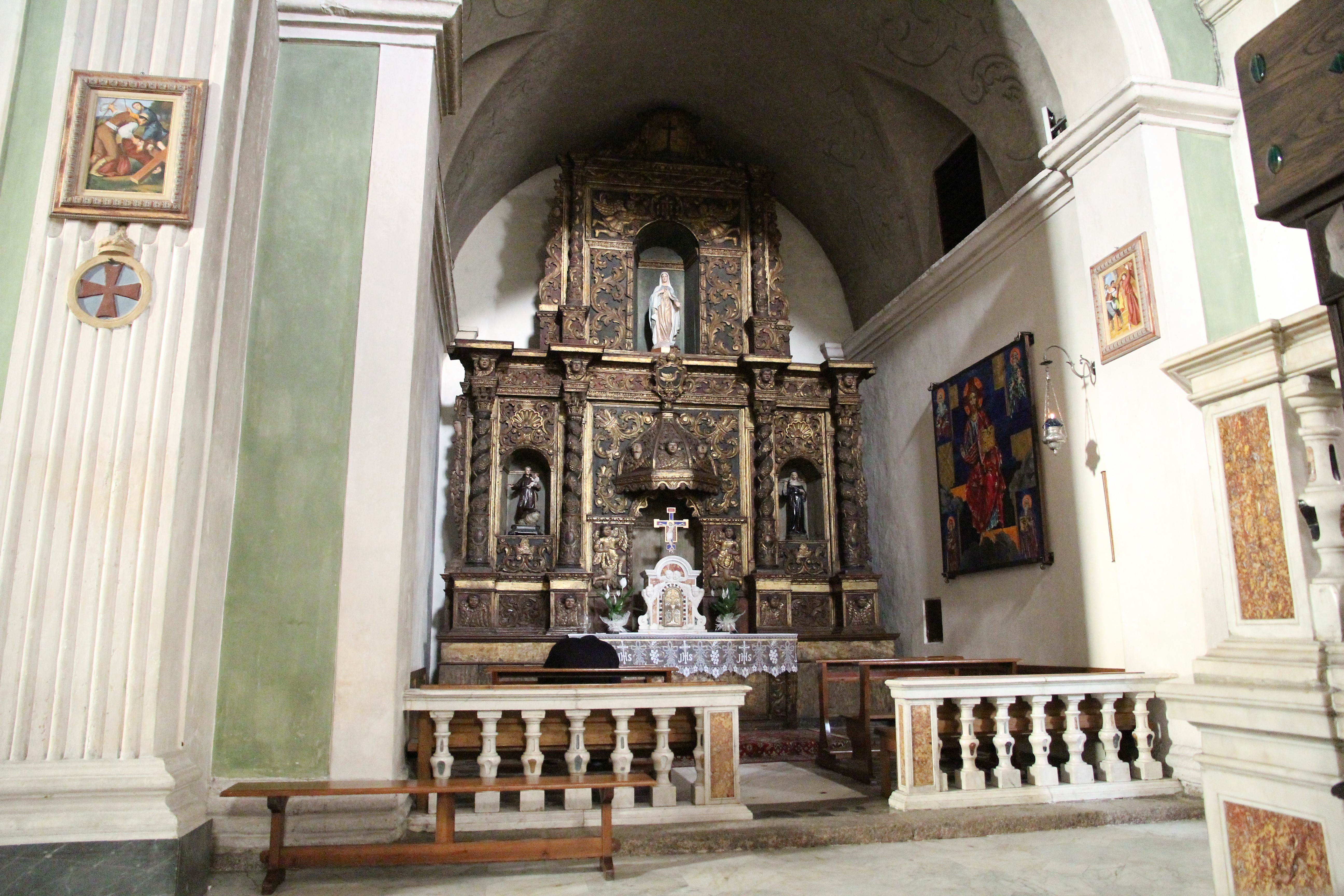 Tempio Pausania, chiesa di San Pietro